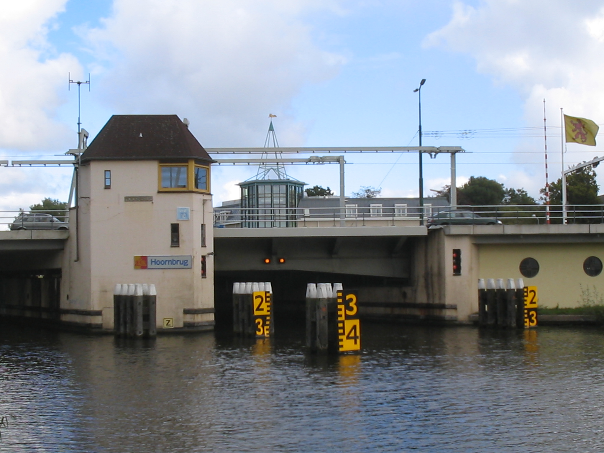 Hoornbrug (bridge) Rijswijk , 2 oktober 2005